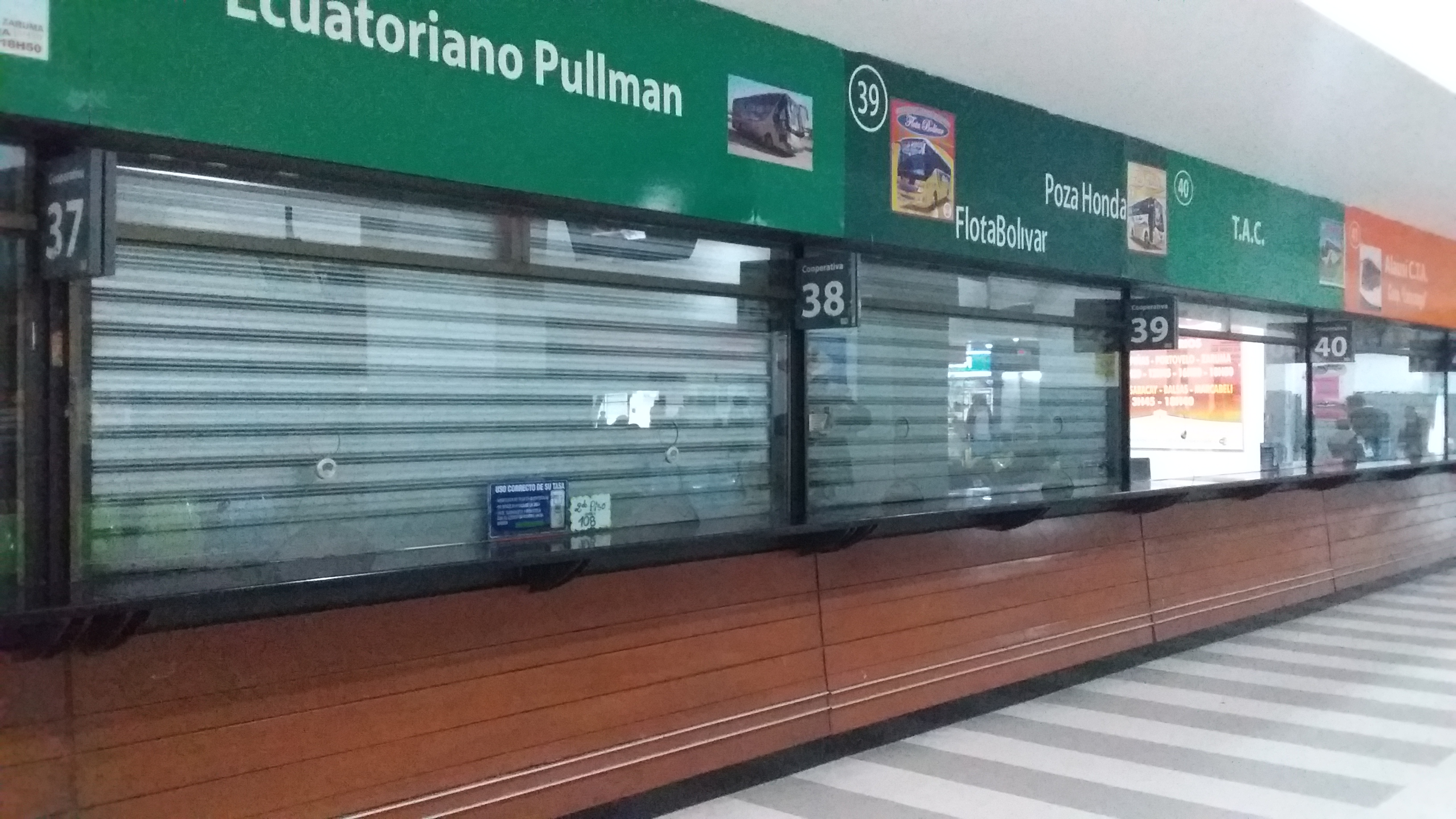 Lugares de Venta de Pasajes en la Terminal Terrestre de Guayaquil cerrados por las protestas